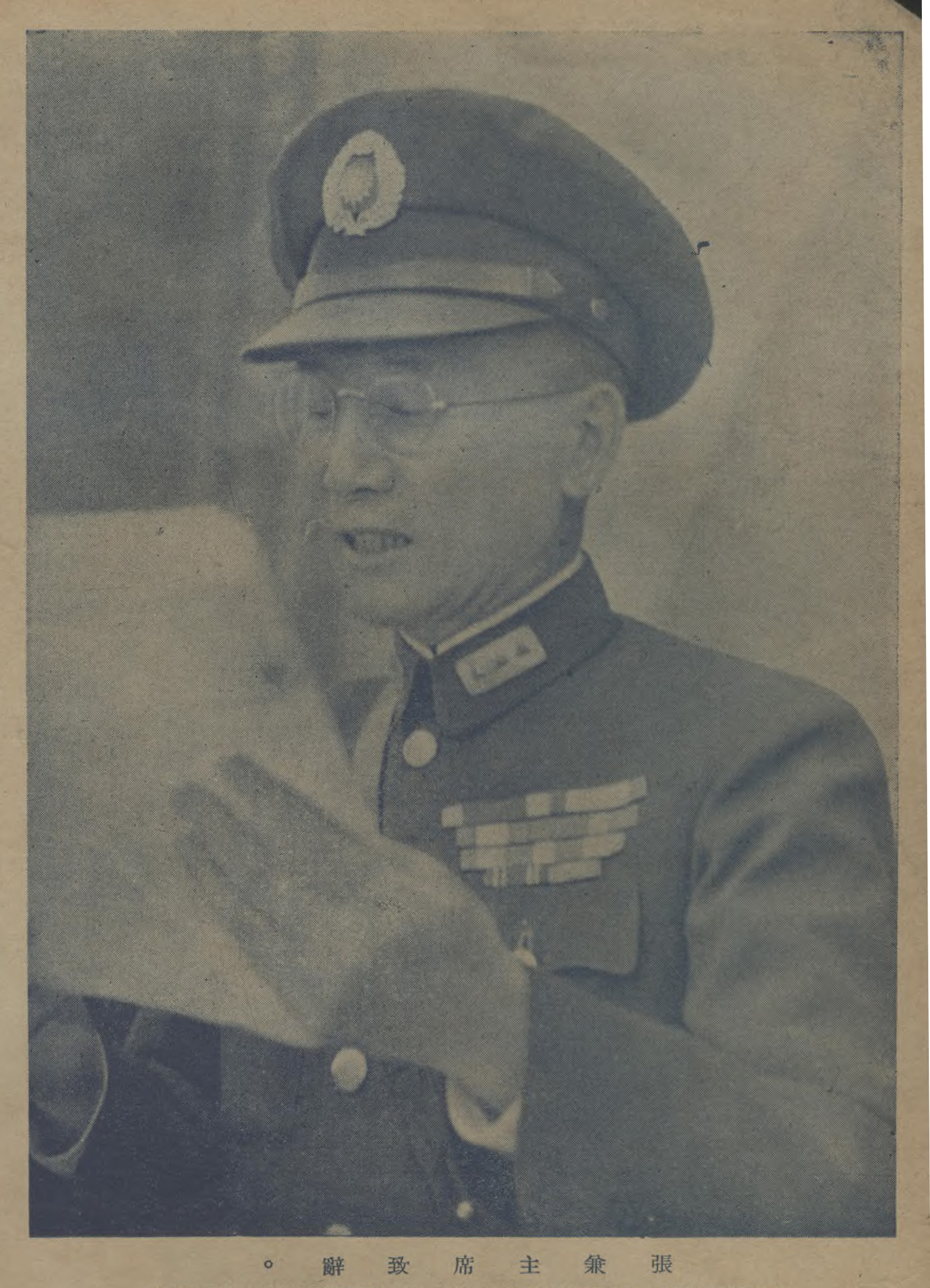 中文（中国大陆）: 迪化各界慶祝和平大會盛況